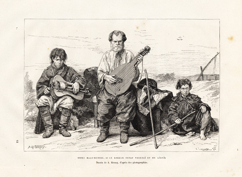 'Types Malo-Russes - Le Kobzar Ostap Veresai et un Lirnik.' (Ukrainian types - The kobzar Ostap Veresai and a Lirnyk). 'Nouvelle Geographie Universelle La Terre et les Hommes V : L' Europe Scandinave, Russe etc.' by Jacques Elisee Reclus, published in Paris by Hachette & Cie., 1880